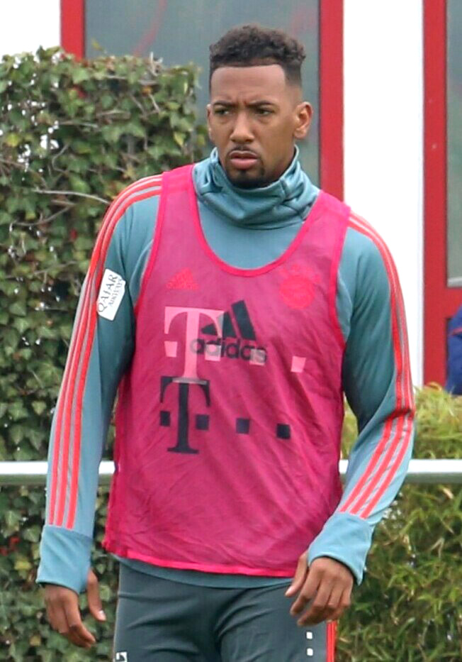 Jérôme Boateng, am 10. April 2019 beim Training auf dem Gelände des FC Bayern München